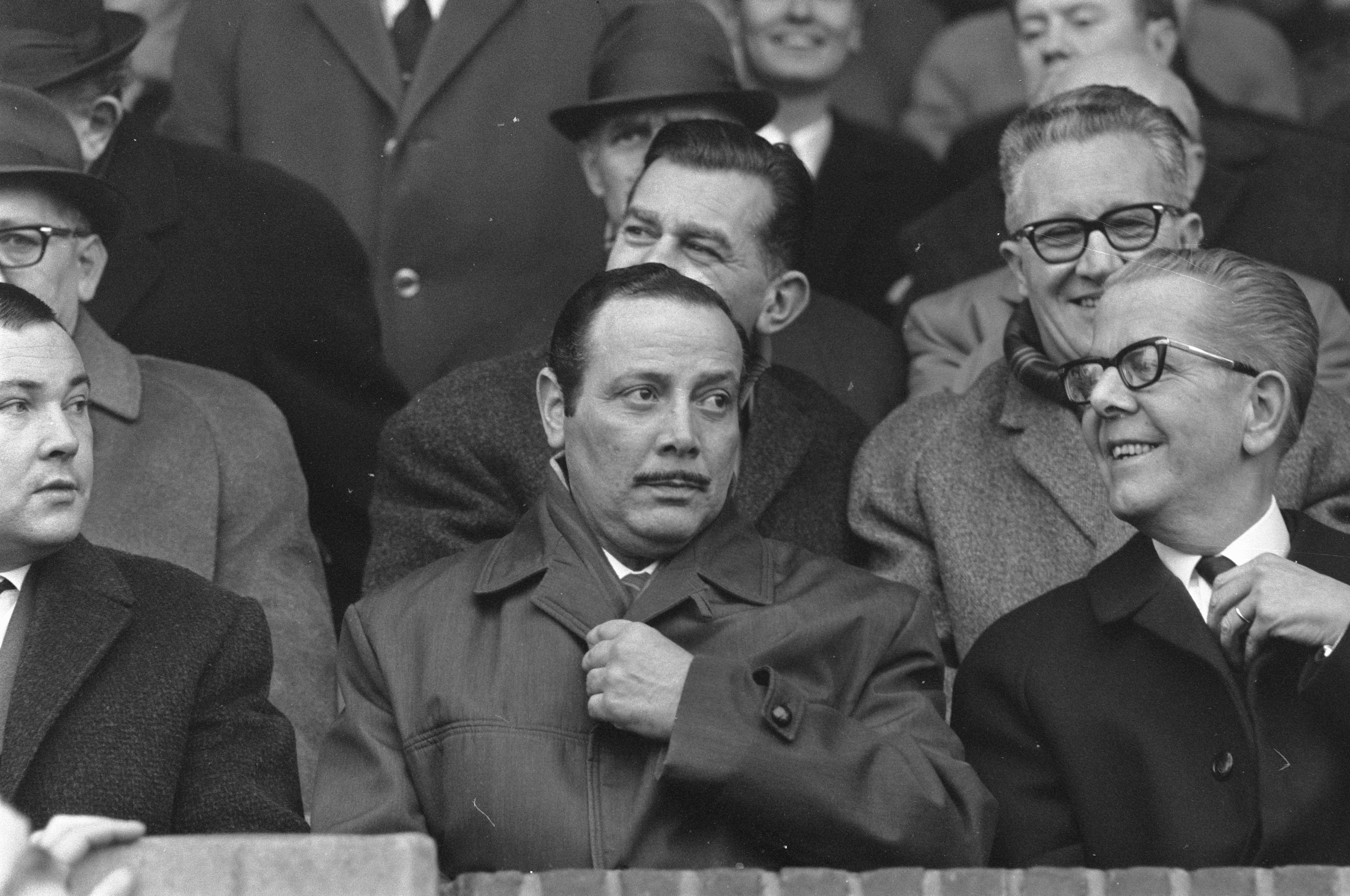 Collectie / Archief : Fotocollectie Anefo Reportage / Serie : [ onbekend ] Beschrijving : Benfica-trainer Otto Gloria (l) op tribune bij NAC tegen Ajax Datum : 12 januari 1969 Trefwoorden : sport, trainers, tribunes, voetbal Persoonsnaam : Gloria, Otto Instellingsnaam : AJAX, NAC Fotograaf : Koch, Eric / Anefo Auteursrechthebbende : Nationaal Archief Materiaalsoort : Negatief (zwart/wit) Nummer archiefinventaris : bekijk toegang 2.24.01.05 Bestanddeelnummer : 922-0081